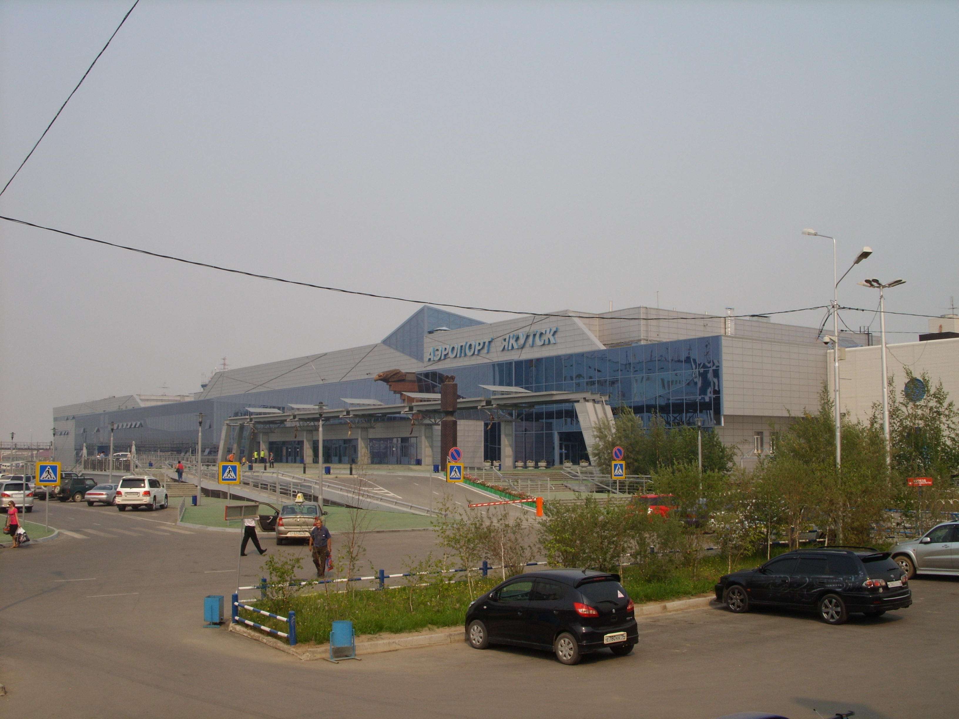 Новый терминал аэропорта "Якутск". Открыт 29.06.2012. Снимок от 03.08.2012